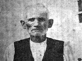 Francisco Leona circa 1910 date QS:P,+1910-00-00T00:00:00Z/9,P1480,Q5727902